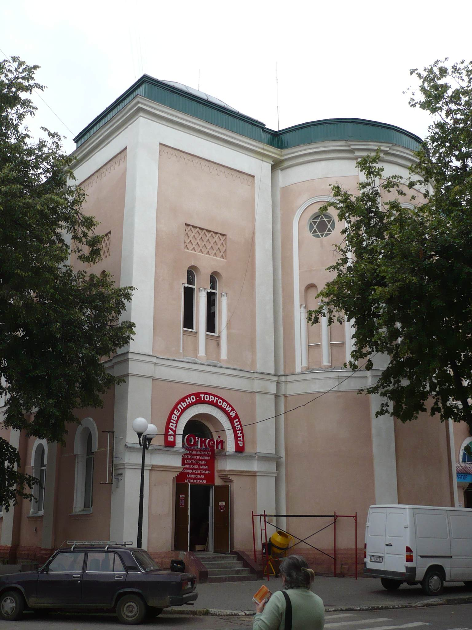 Stanisławów, synagoga, 2009 r.